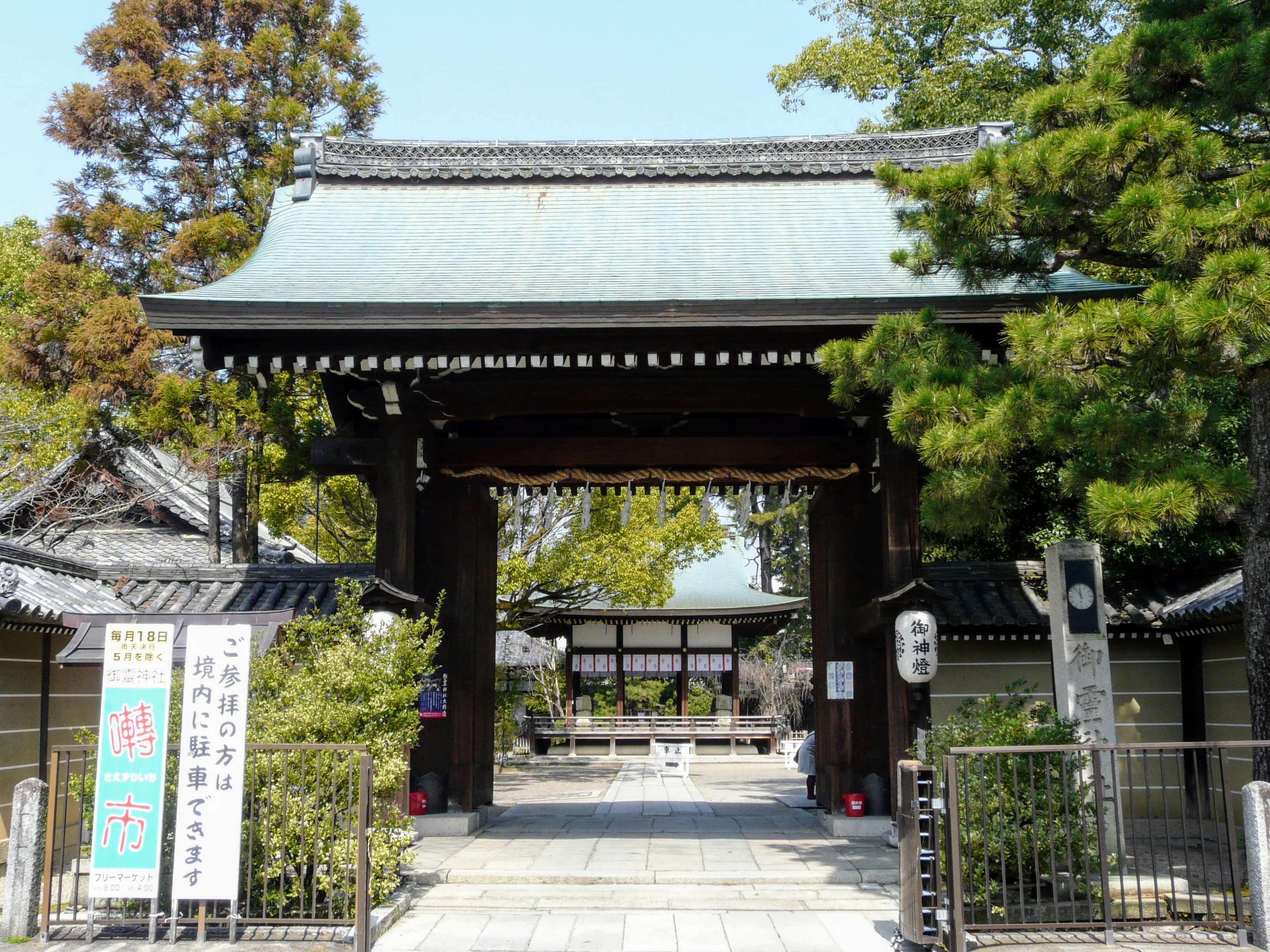 上御霊神社の四脚門 Panasonic Lumix DMC-FZ18